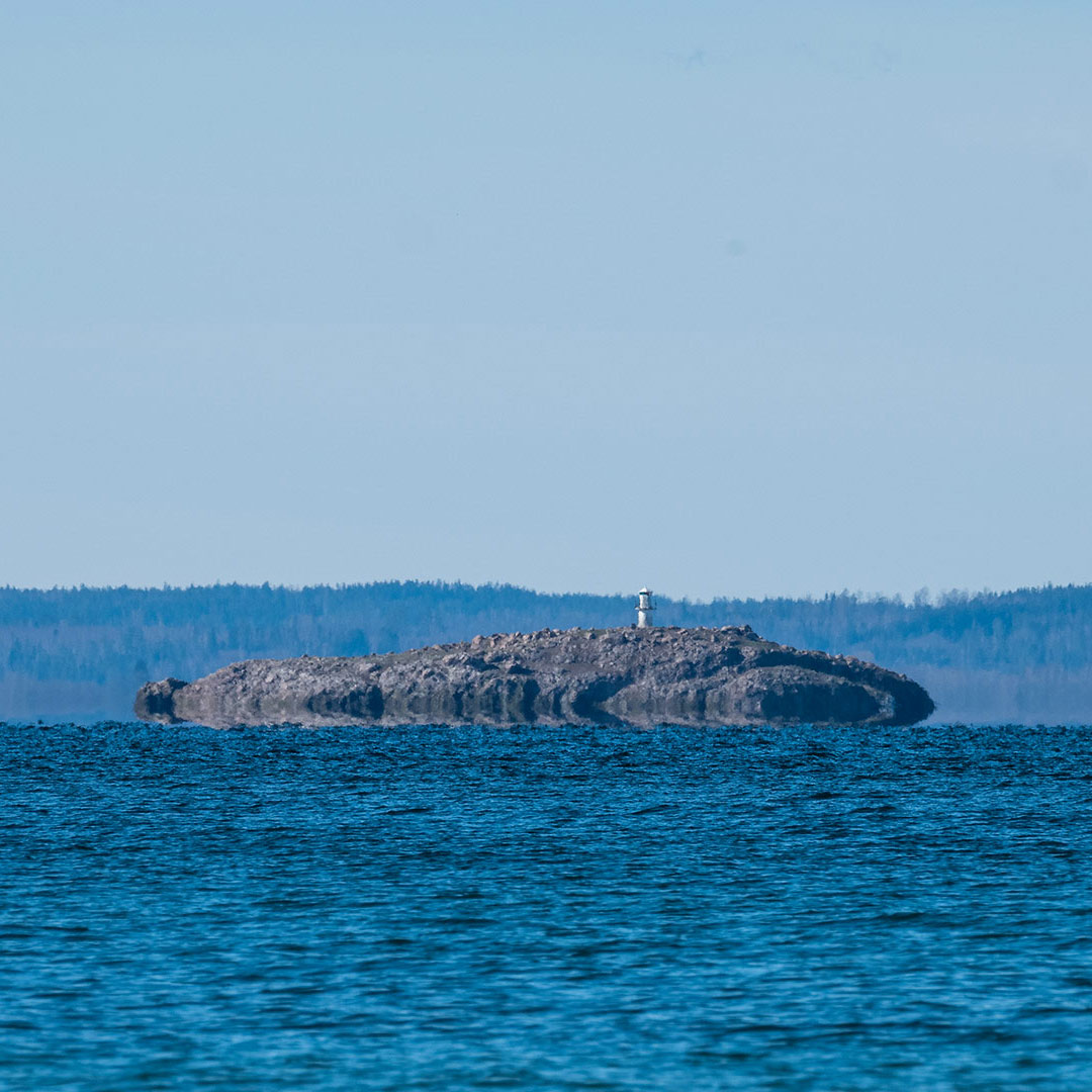 Ön Jungfrun i sjön Vättern